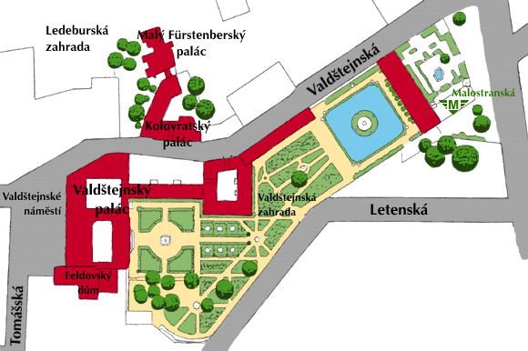 map of Valdstejnsky palace